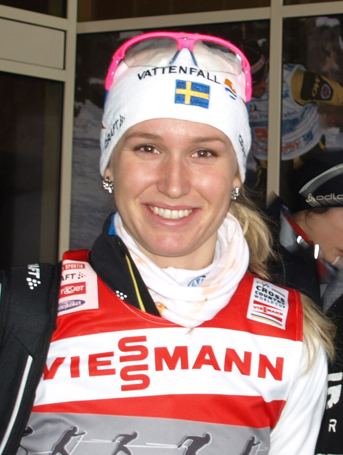 Magdalena Pajala